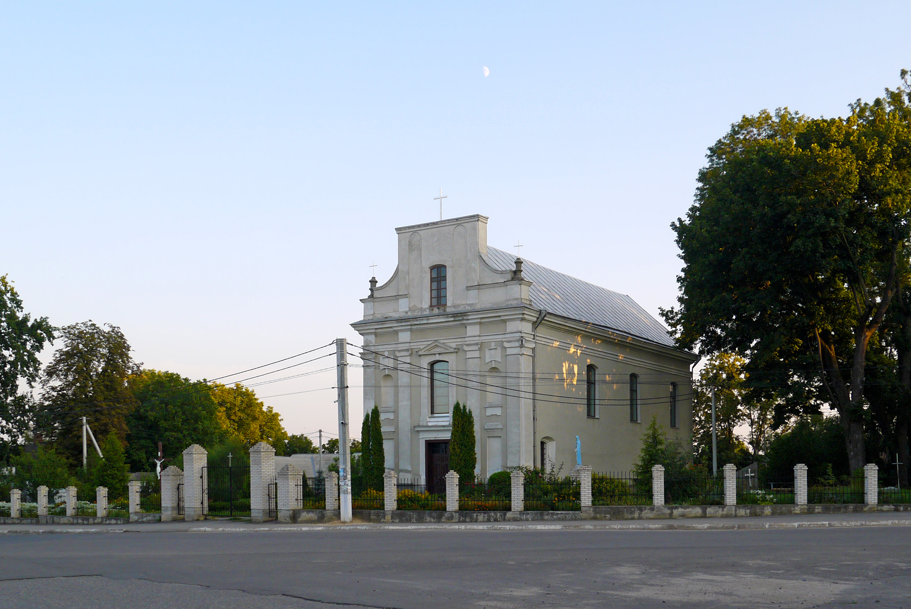 Костьол Михаїла Архангела, Вороновиця